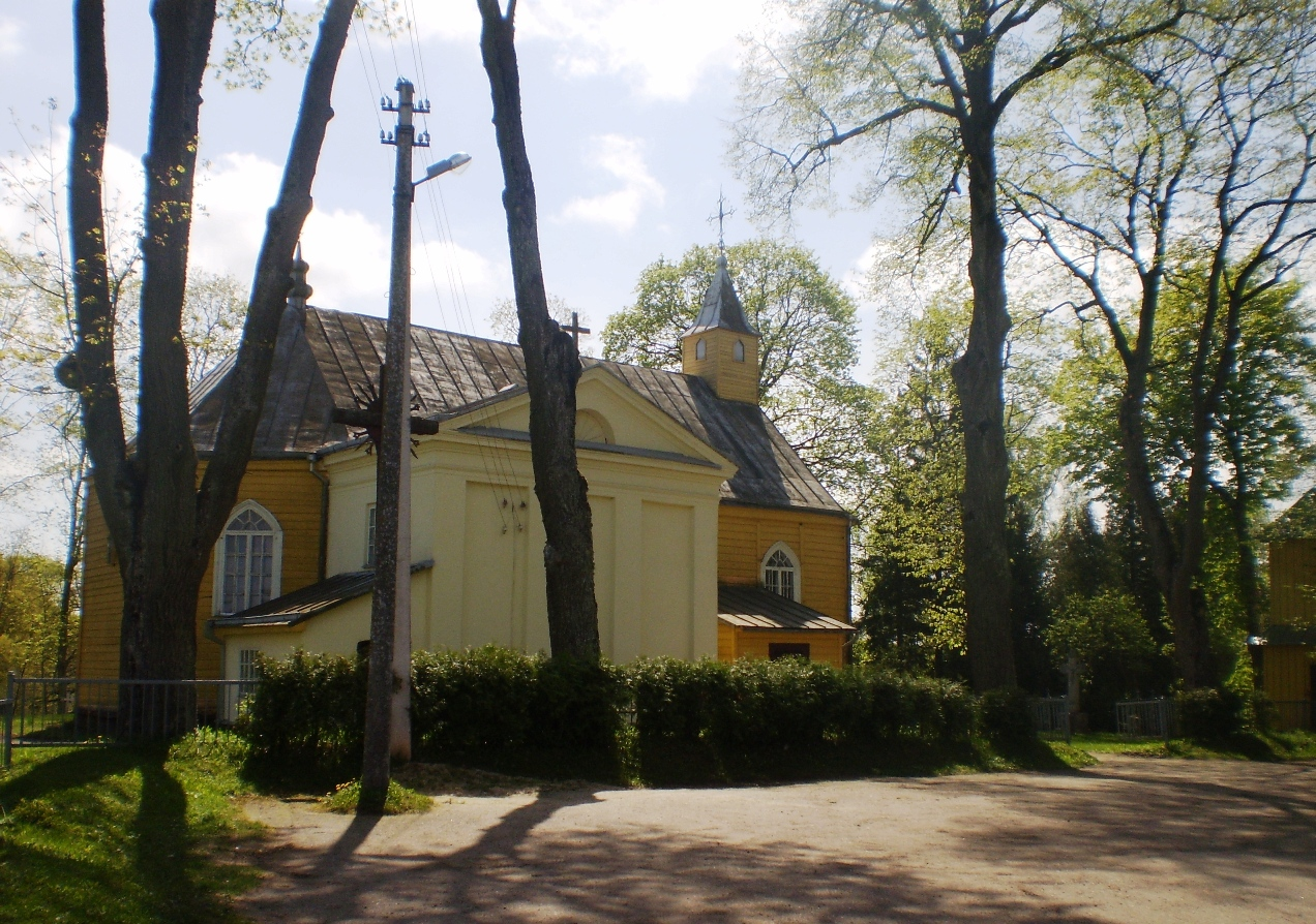 Šventybrasčio bažnyčia, Kėdainių raj.